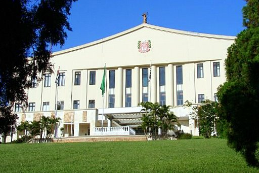 The "Palácio dos Bandeirantes" (Bandeirantes Palace) in Morumbi, SP, Brazil